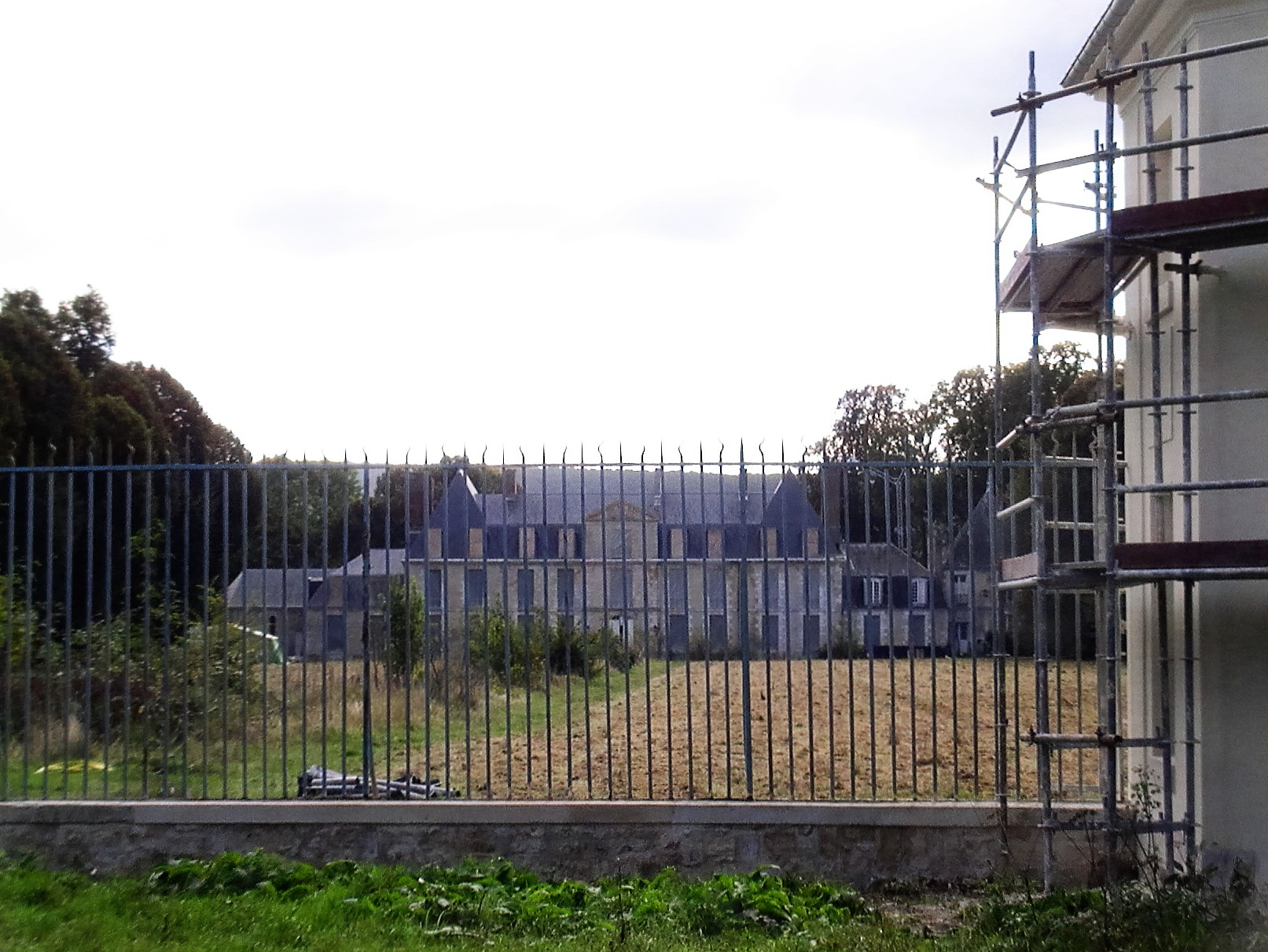 Tosny (Eure) - Le château, côté bois - façade droite, avec pavillon.